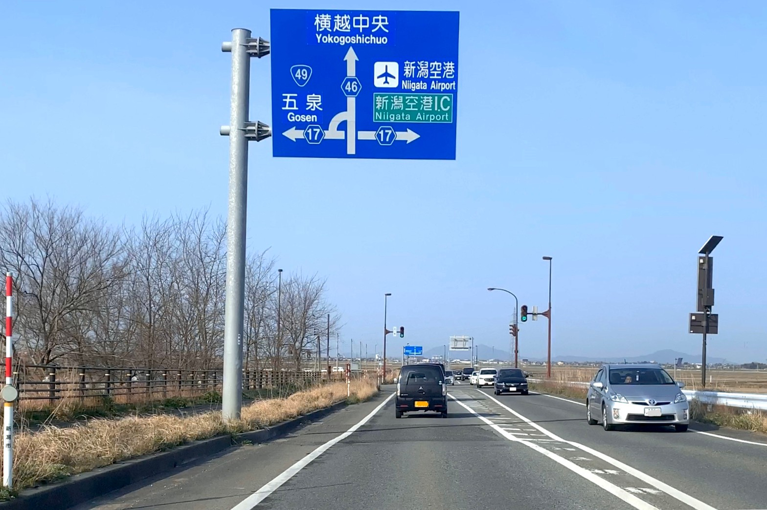 新潟県道46号新潟大外環状線 大阿賀橋西詰付近（新潟市江南区，2020年4月）